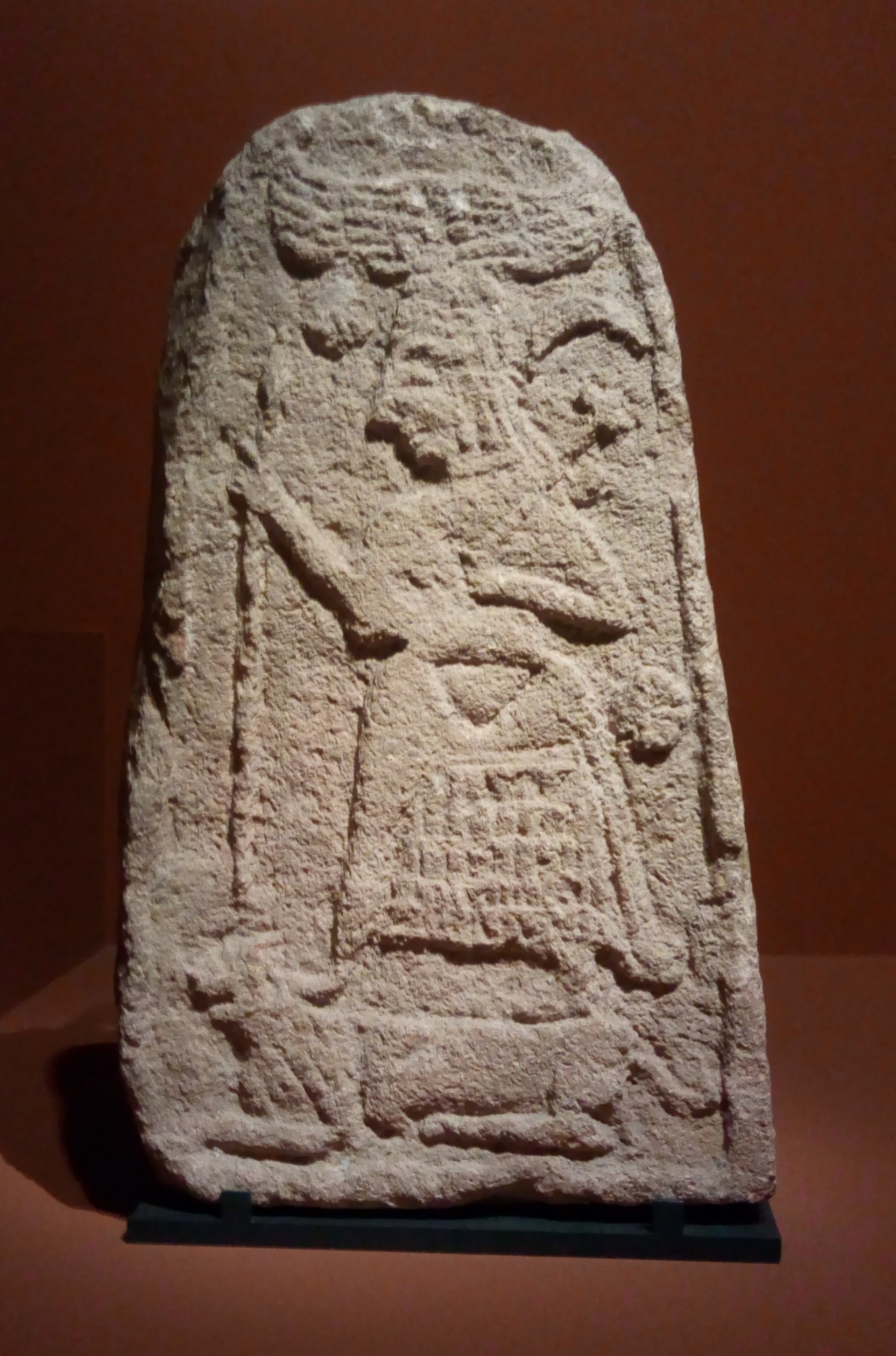 Stèle en calcaire, représentant une déesse, sans doute Shaushka / Ishtar, provenant probablement de Syrie du Nord de l'époque araméenne/néo-hittite, 10e ou 9e s. av. J.-C. Bibliographie : Vincent Blanchard (dir.), Royaumes oubliés : De l'empire hittite aux Araméens, Paris, Louvre Éditions - Lienart, 2019, p. 308. Photographie prise lors de l'exposition Royaumes oubliés : De l'empire hittite aux Araméens, juillet 2019.